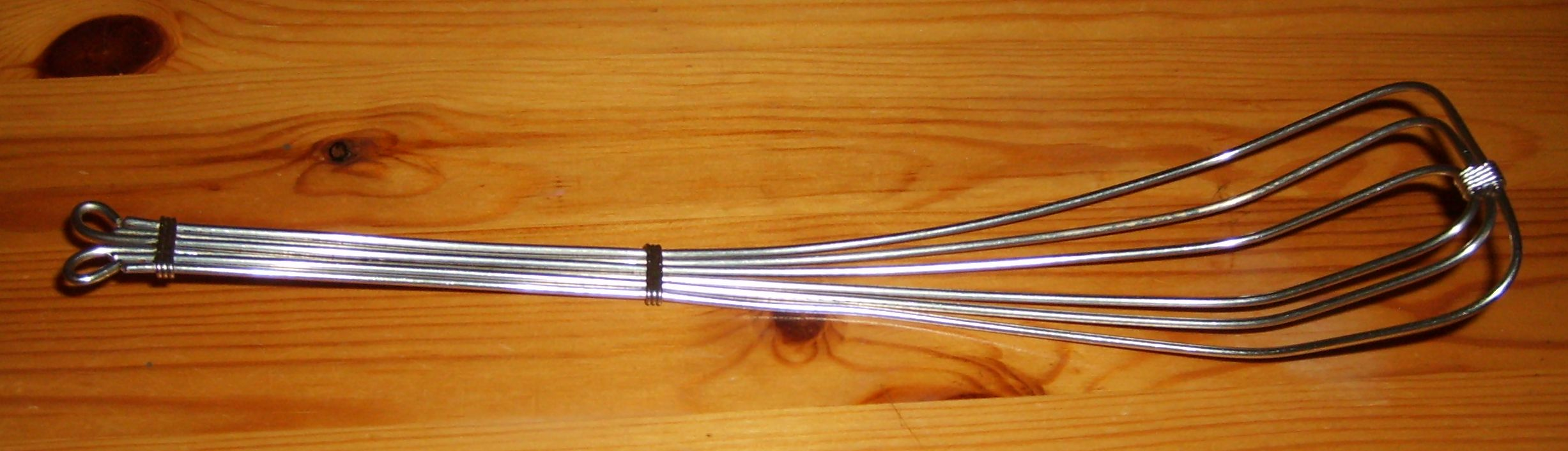 Trådvisp.